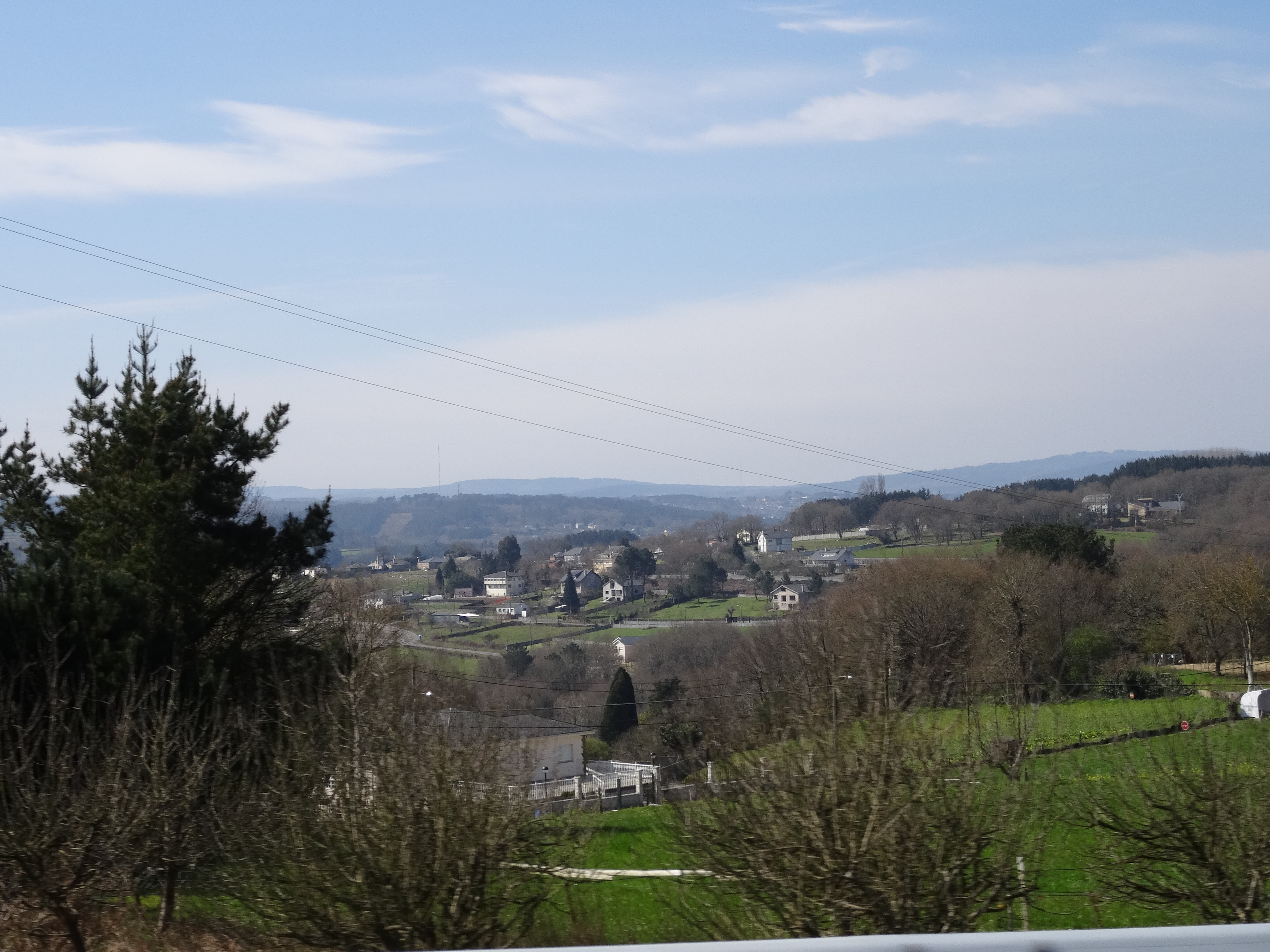 Vista de San Mamede dos Anxos, Lugo, dende a A-6.